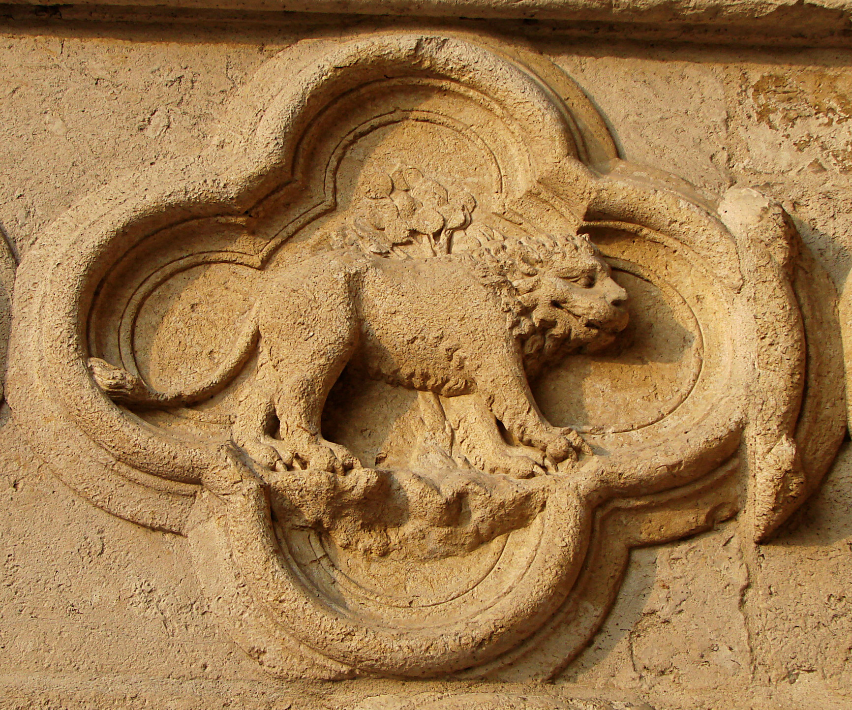 Le lion (Leo) ;un des signes du zodiaque complet figurant sur le portail gauche de la façade de la cathédrale d'Amiens.